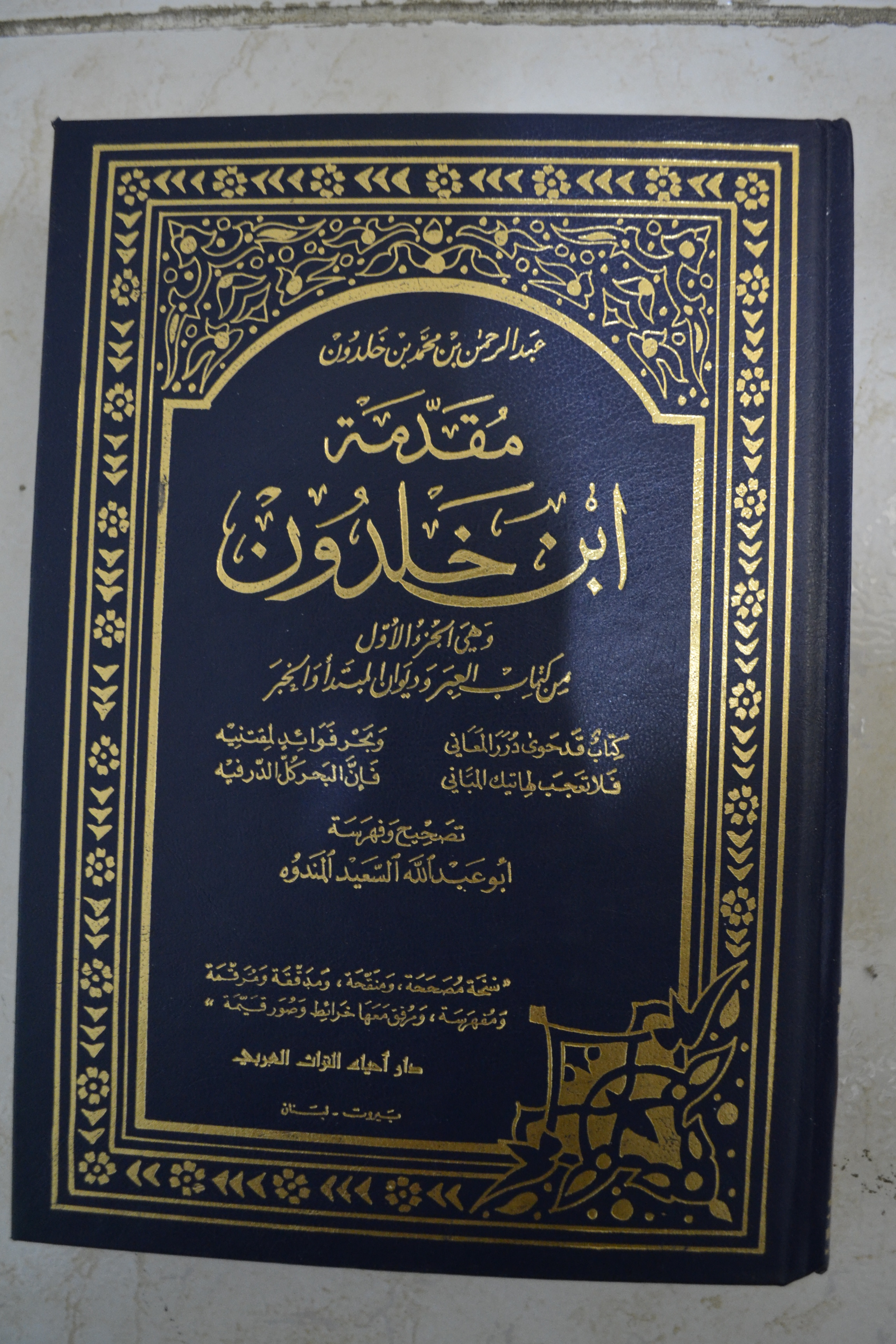 Kitab Muqaddimah ini ditulis oleh Ibnu Khaldun